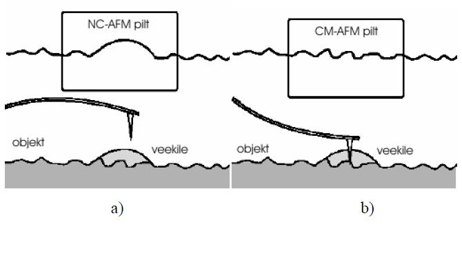 Topograafia erinevates töörežiimides